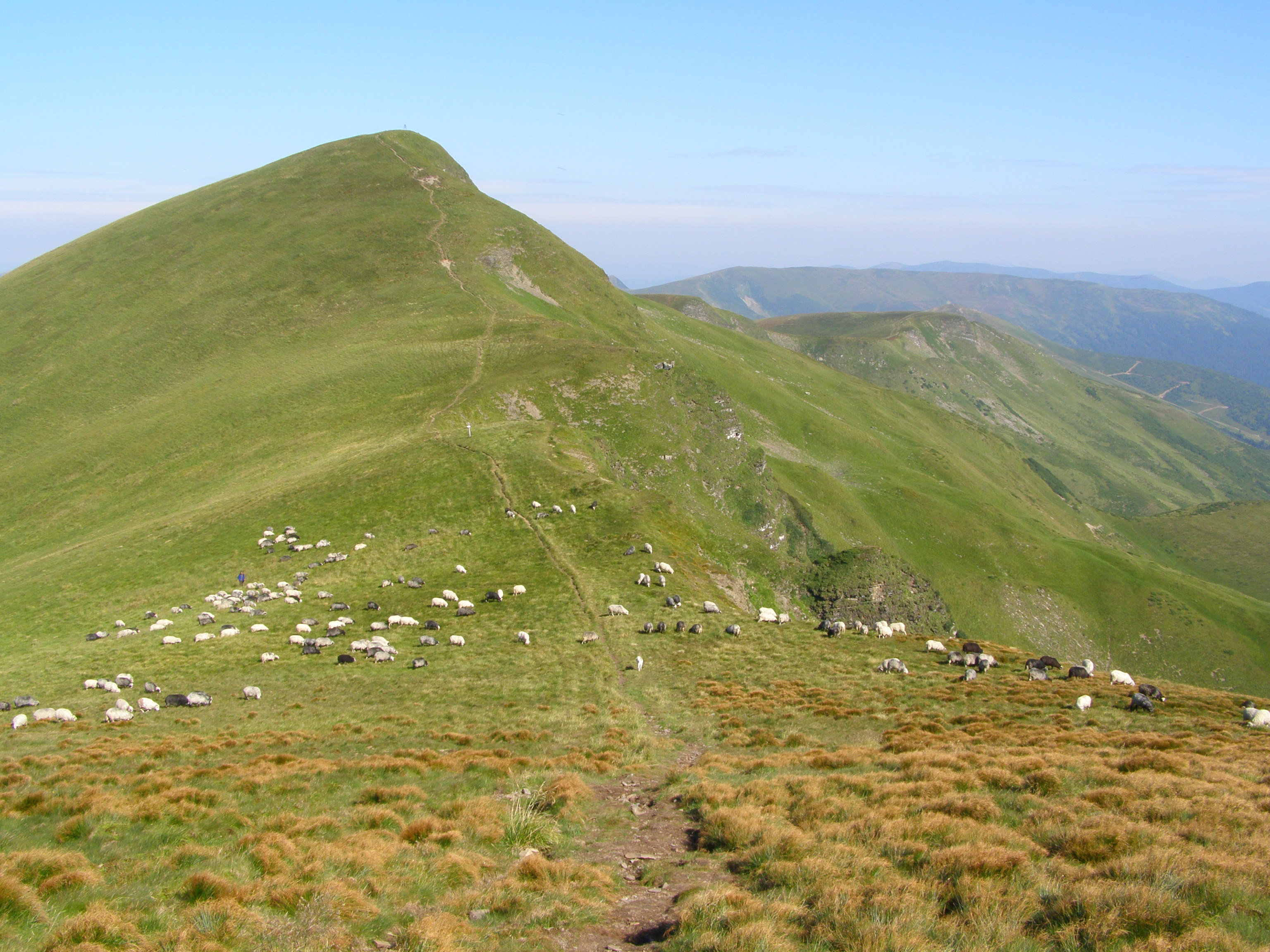 Svydovec, pohled na vrchol Blyznycja (1881 m) od jihu